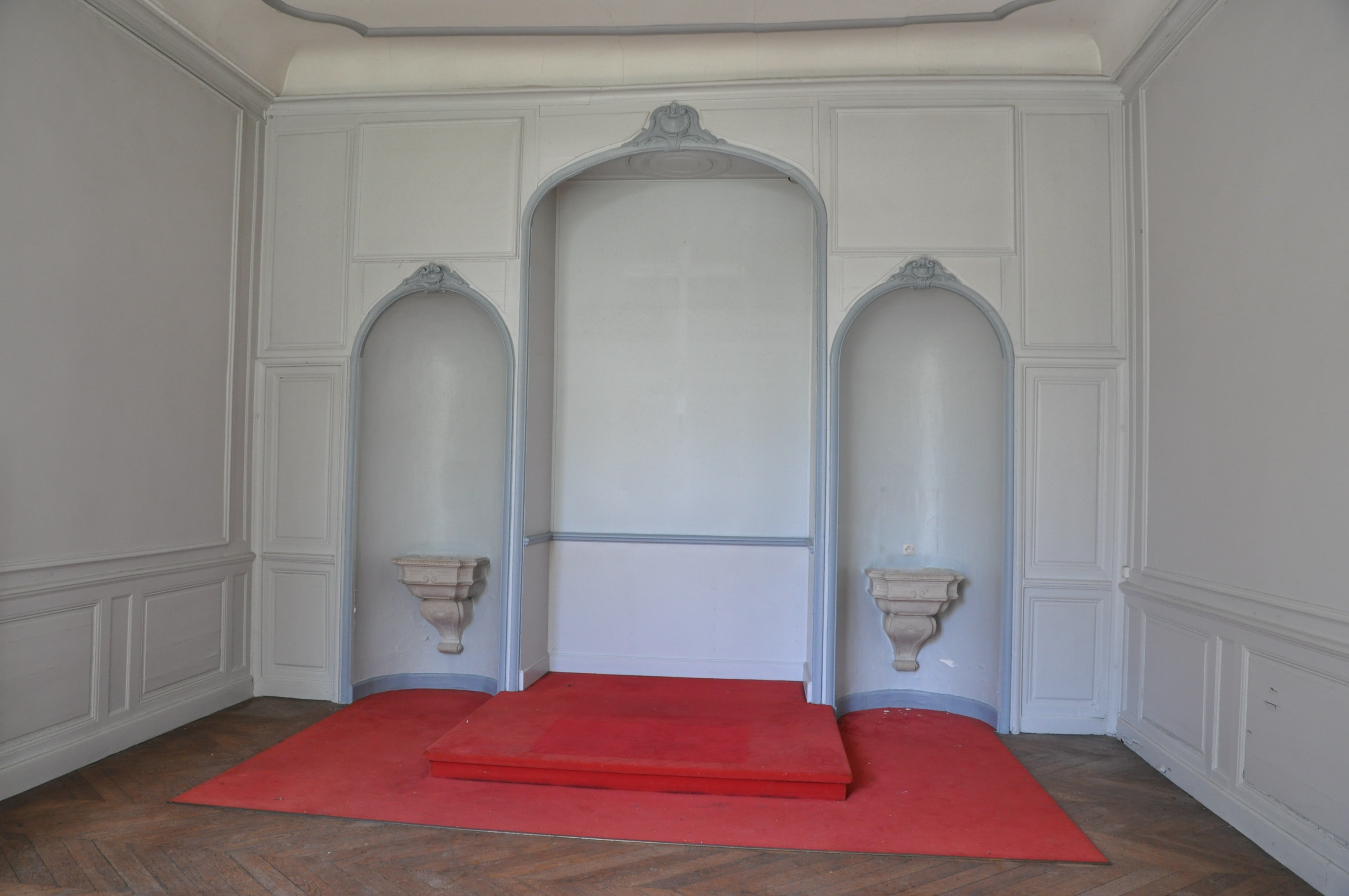 chapelle